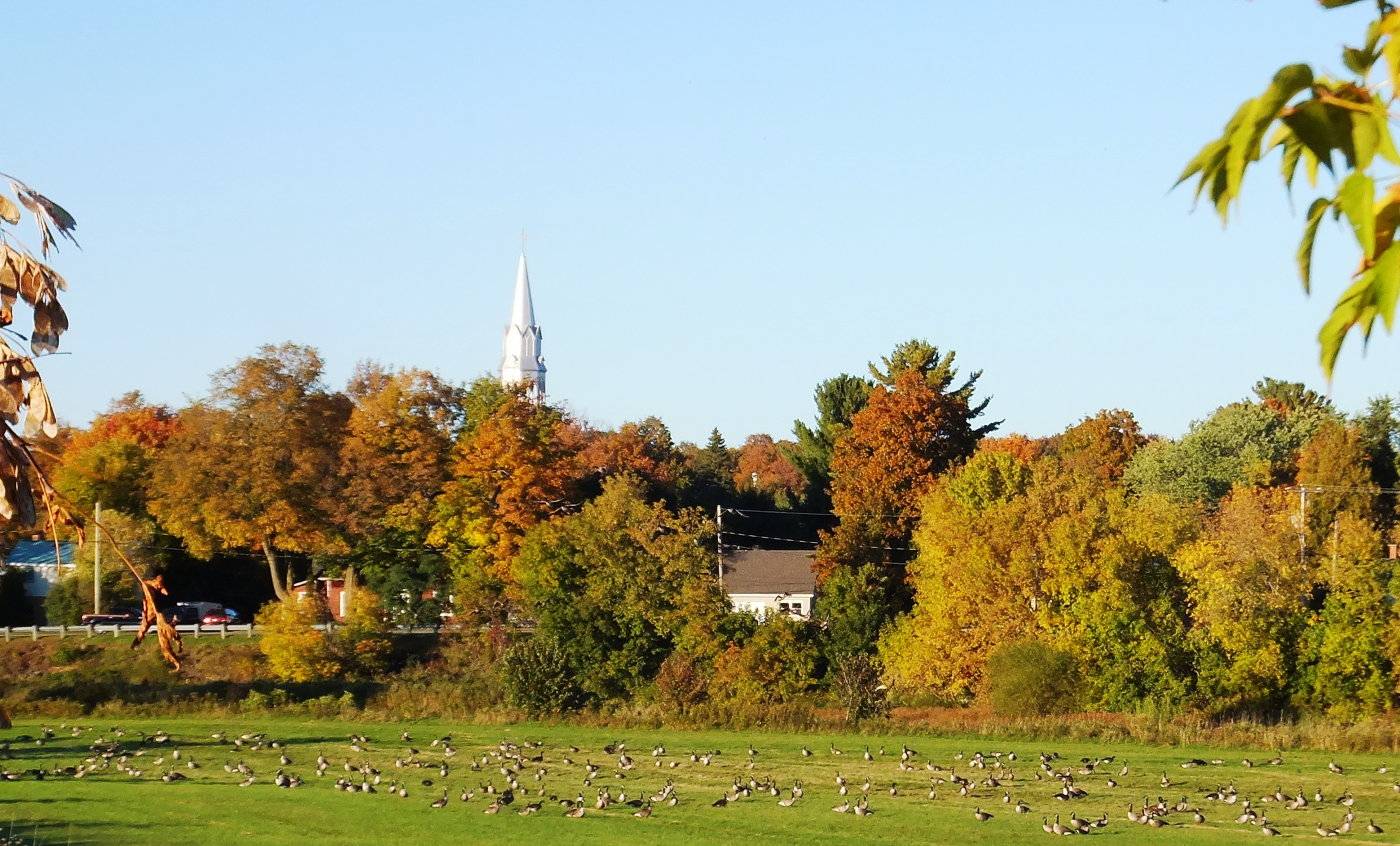 Bernaches du Canada (Branta canadensis) sur la plaine alluviale en face du village de Roxton Falls à la fin septembre 2013